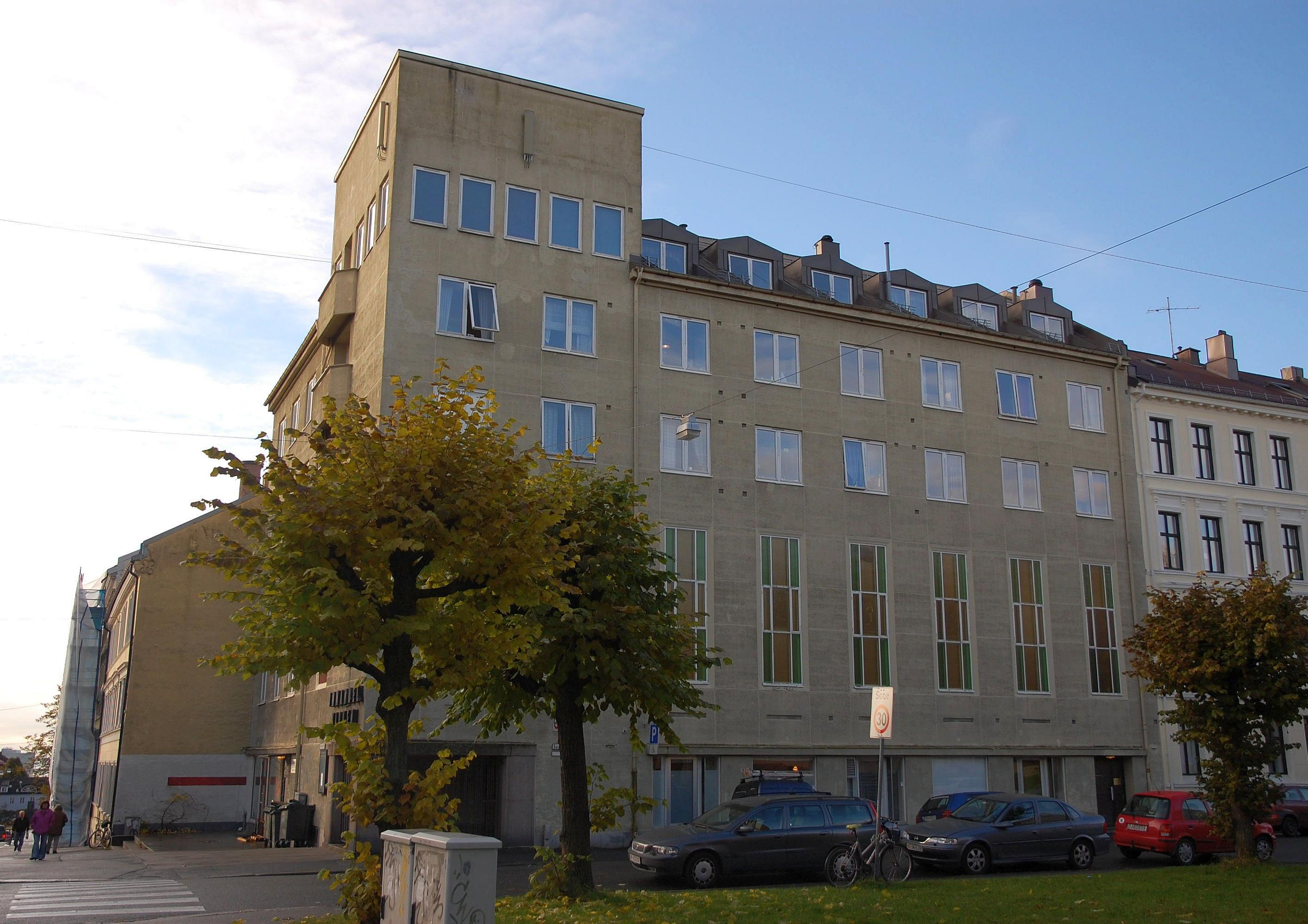 Immanuelkirken i Bergensgata 12 på Sagene i Oslo